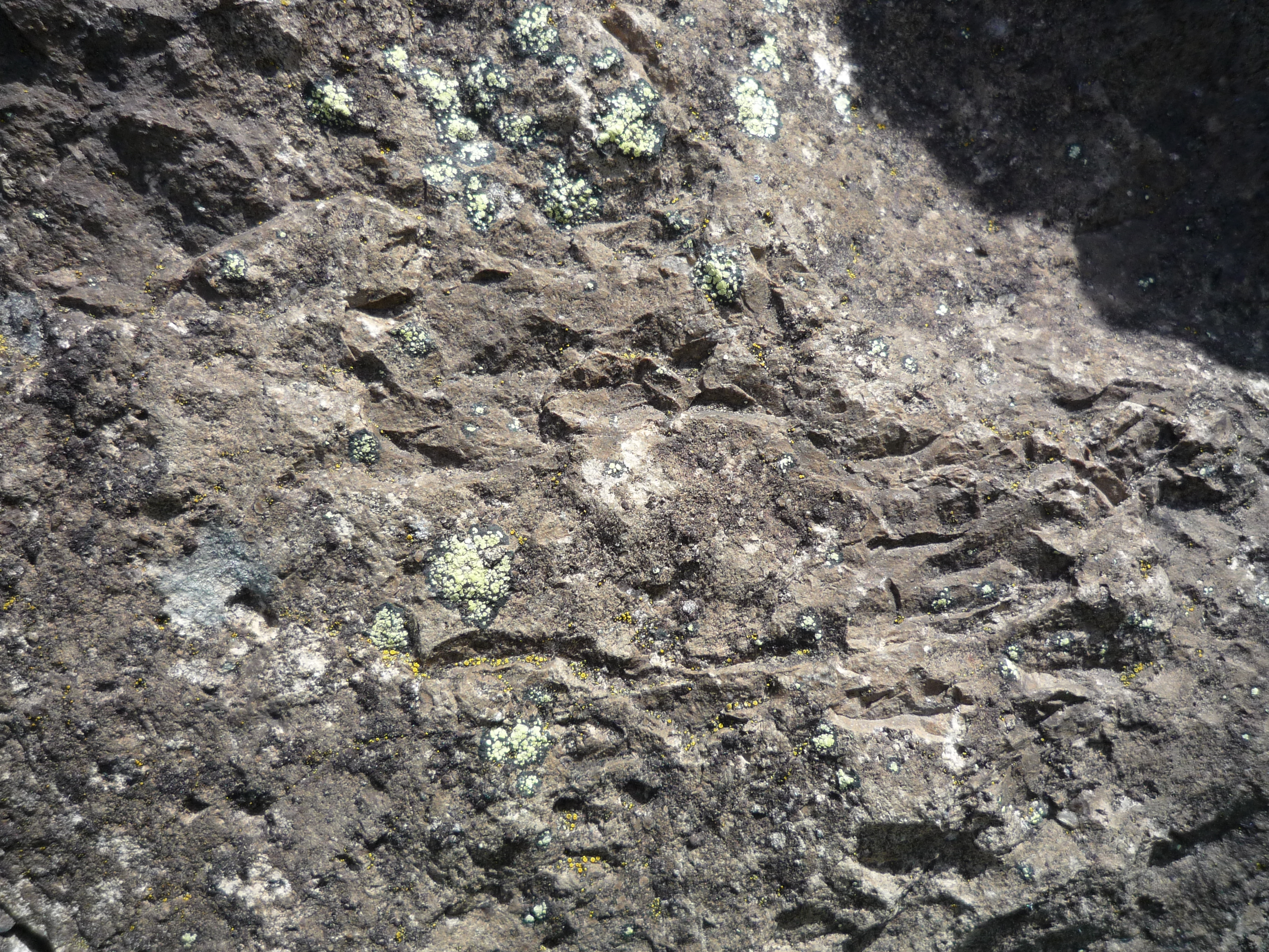 Angwitterter und mit Flechten bewachsender Phonolith am Hohentwiel im Bereich der Festung